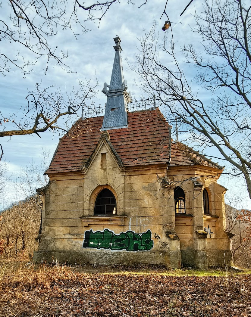 Csobánkán a XX. század elején épült ki a Szent Hubertus nyaralótelep. Az itt élő művészek és építészek ingyenes munkával járultak hozzá a telep csinosításához. A domb csúcsán álló neogótikus Szent Hubertus kápolnát a Hubertus vadásztársaság létesítette 1905-ben, a margitligeti akkori villatulajdonosok és a vadásztársaság tagjai adományából. This is a photo of a monument in Hungary. Identifier: 14873